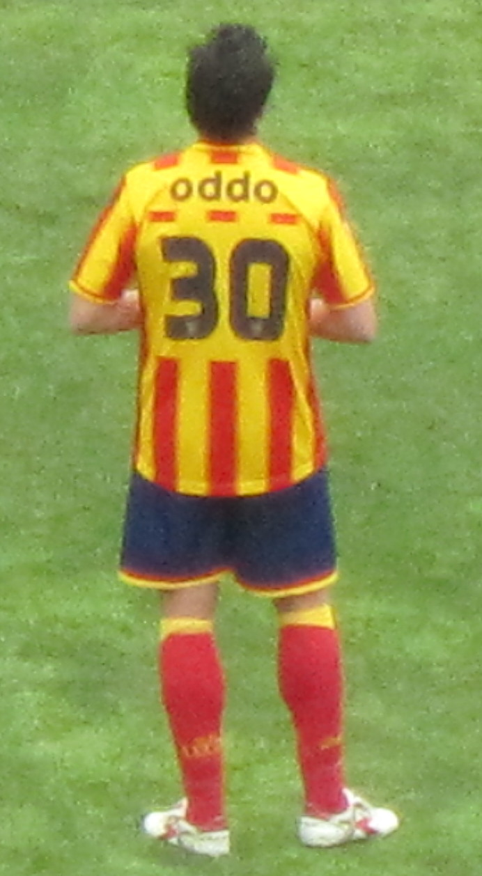 Massimo Oddo in U.S. Lecce - A.S. Roma 4 - 2, Stadio Via del Mare, April 7th, 2012